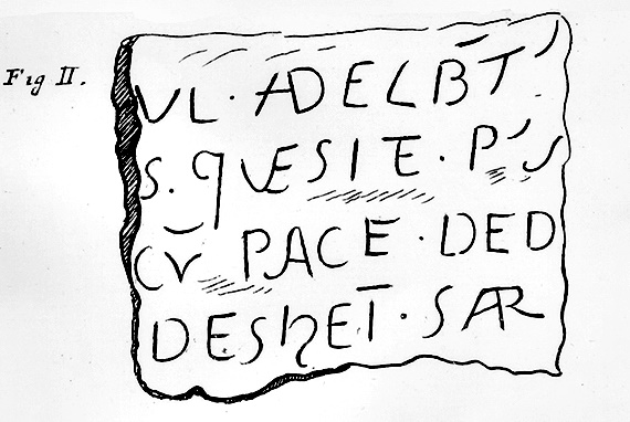 Zeichnung des Grabplattenfragments des Wormser Bischofs Adalbert II. (+ 1107), ehemals Cyriakusstift Worms-Neuhausen